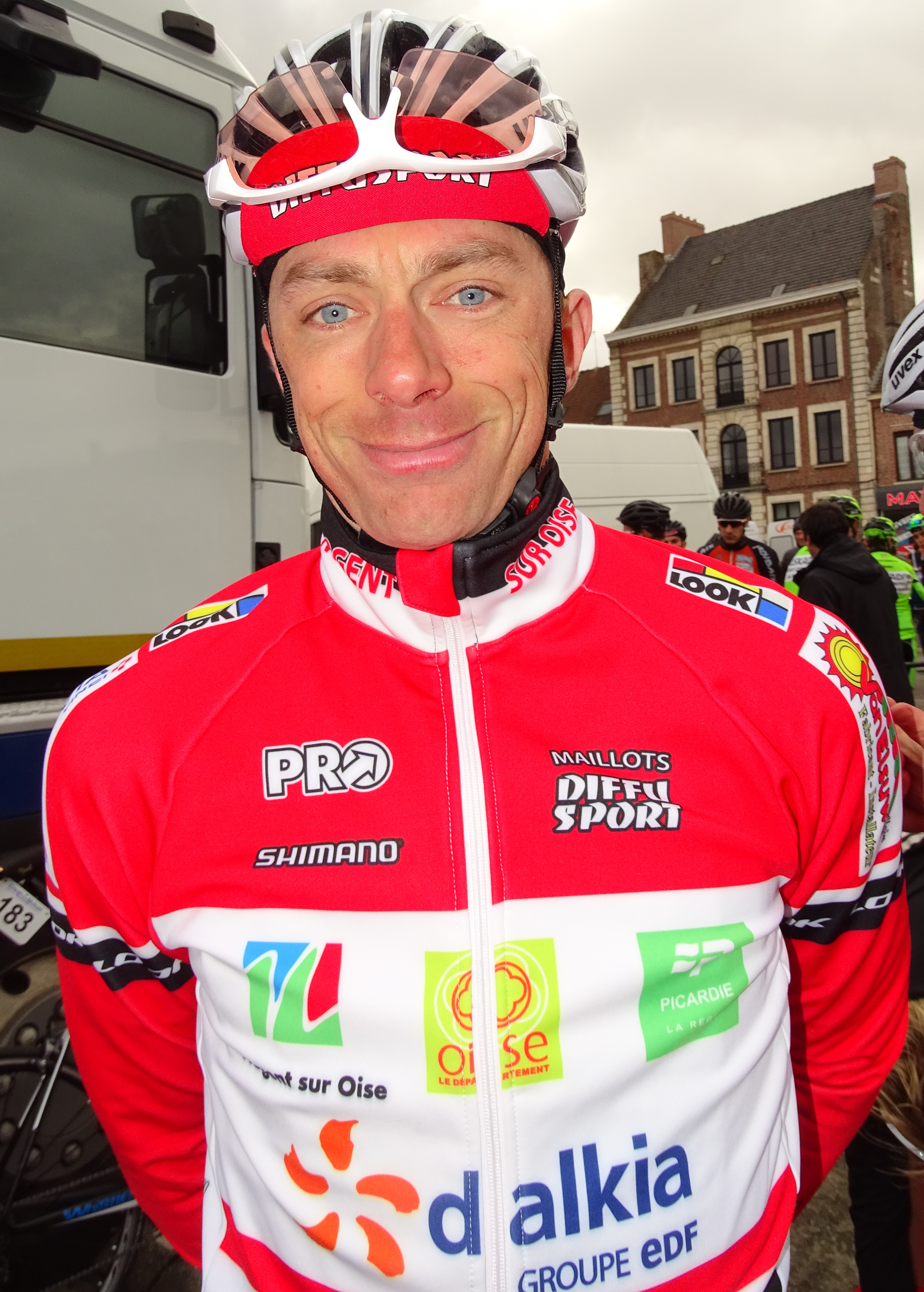 Reportage réalisé le dimanche 6 mars à l'occasion du départ et de l'arrivée du Grand Prix de Lillers-Souvenir Bruno Comini 2016 à Lillers, Pas-de-Calais, Nord-Pas-de-Calais, France.